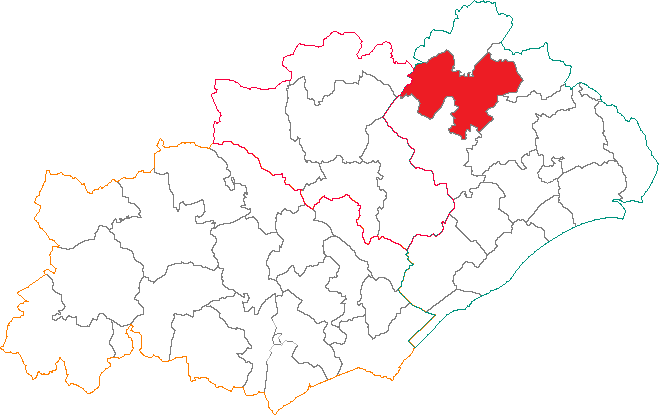 Situation du canton dans le département de l'Hérault.